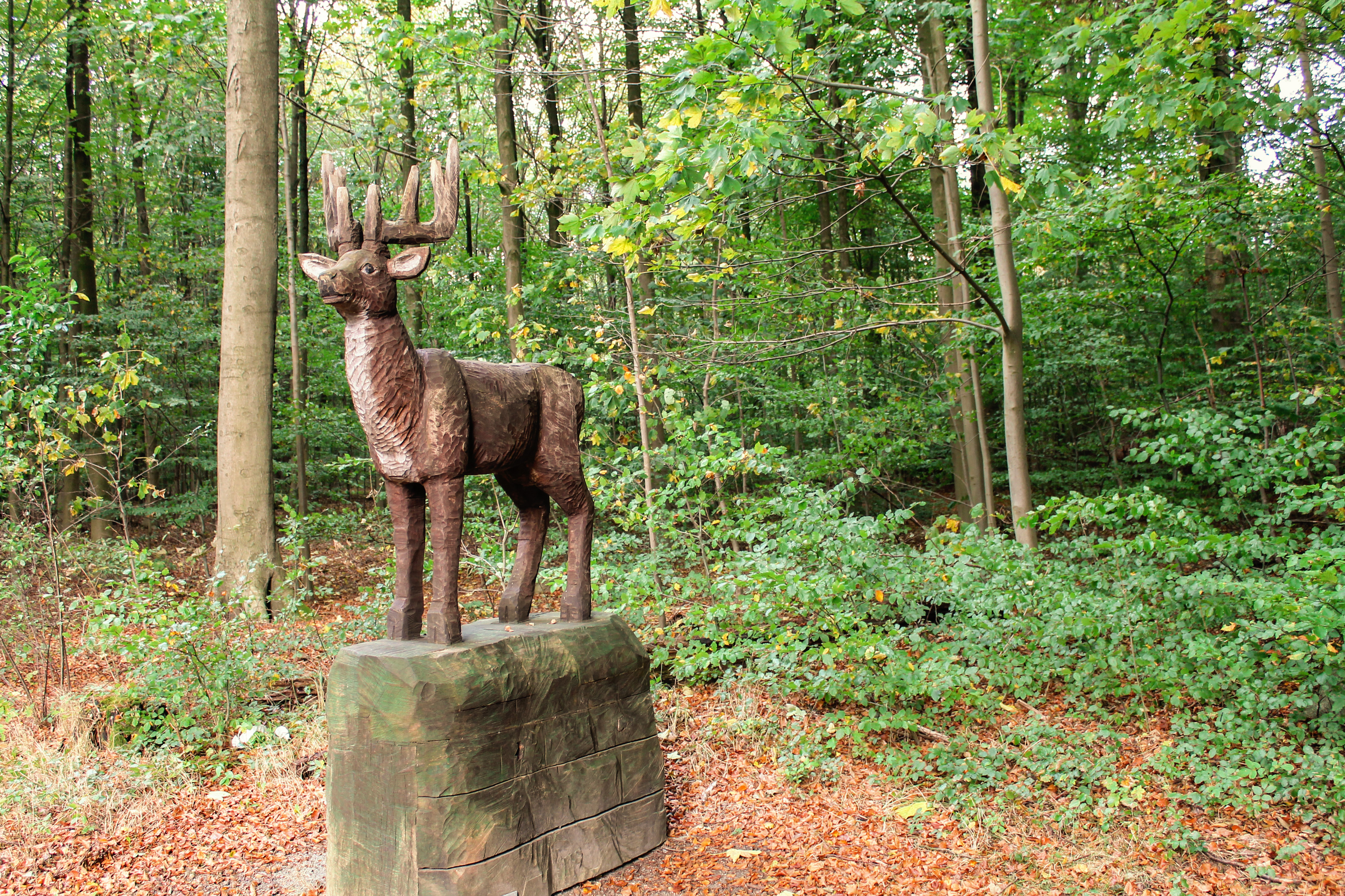 Wald-Weg-Zeichen, Syke 2014 (dauerhaft ausgestellt im öffentlichen Raum)